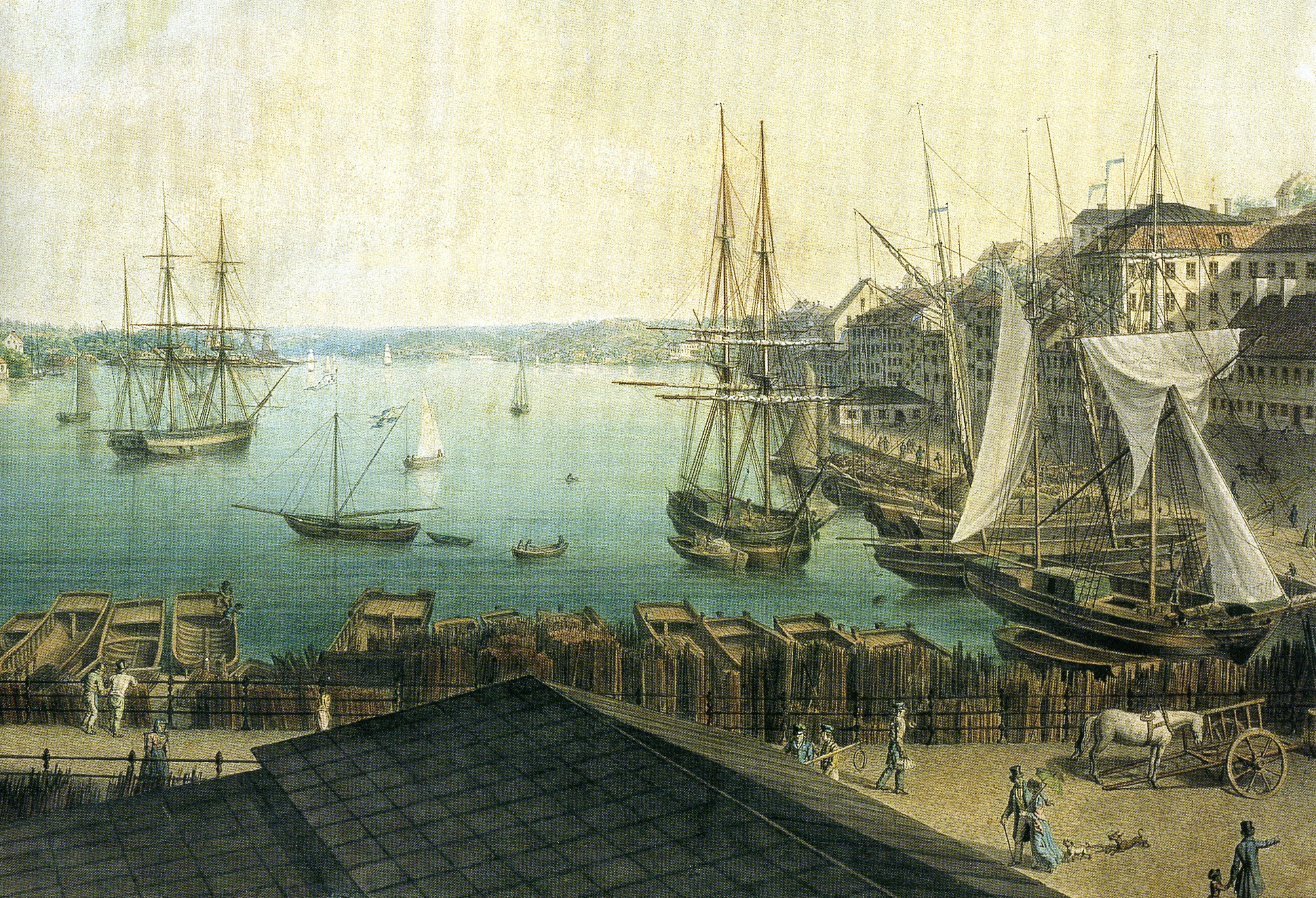 detail